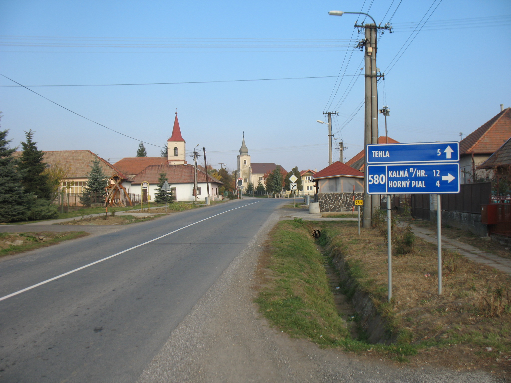 Barsbese templomai